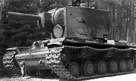 Een KV-2 in een bos bij Moskou.